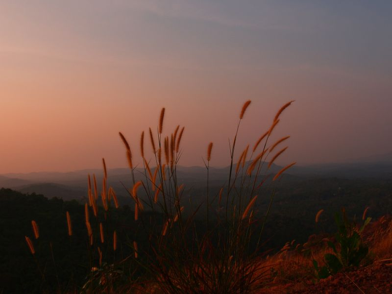 dhruvaraj